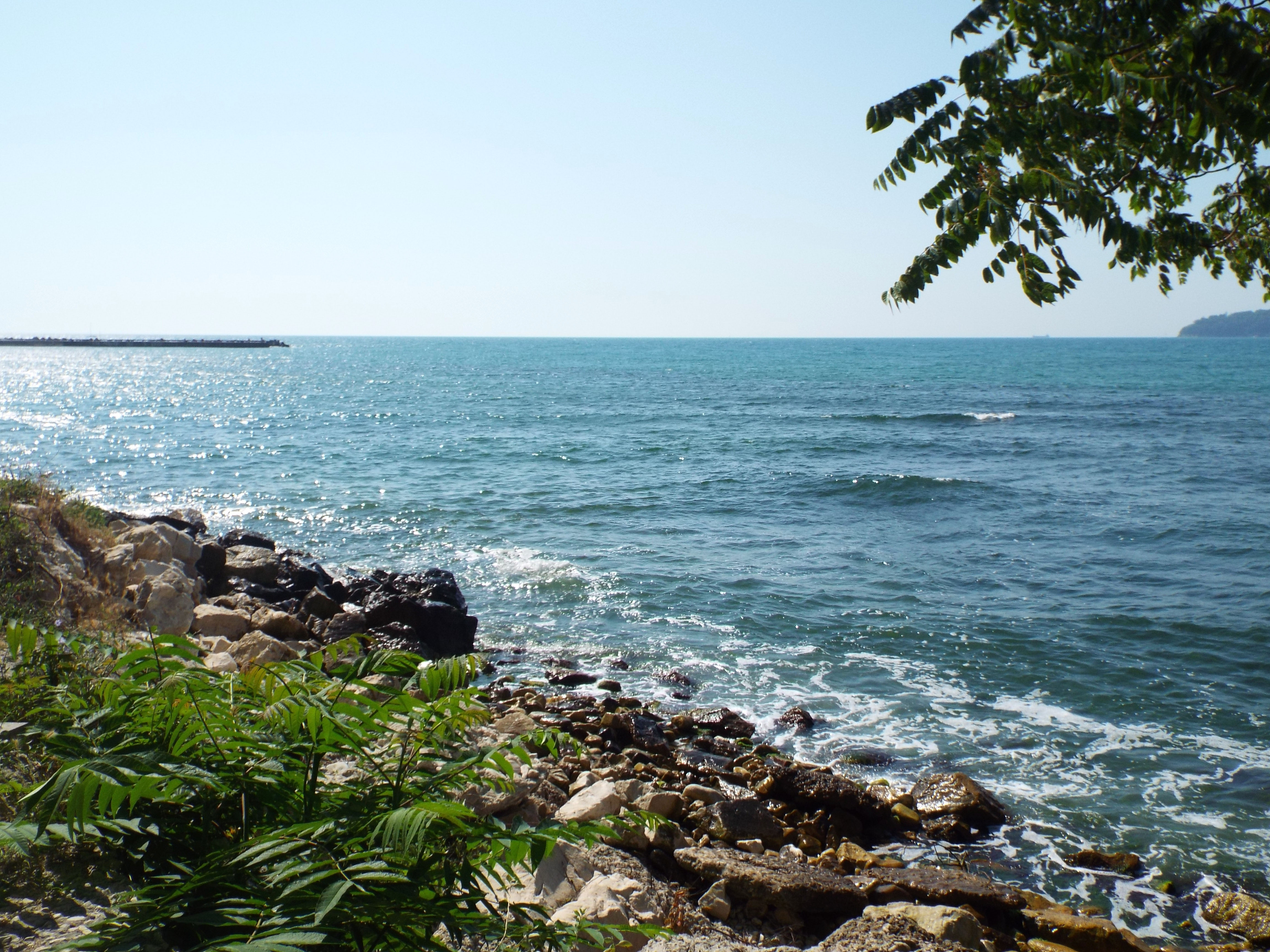 Кадър от Черно море, заснет от град Варна